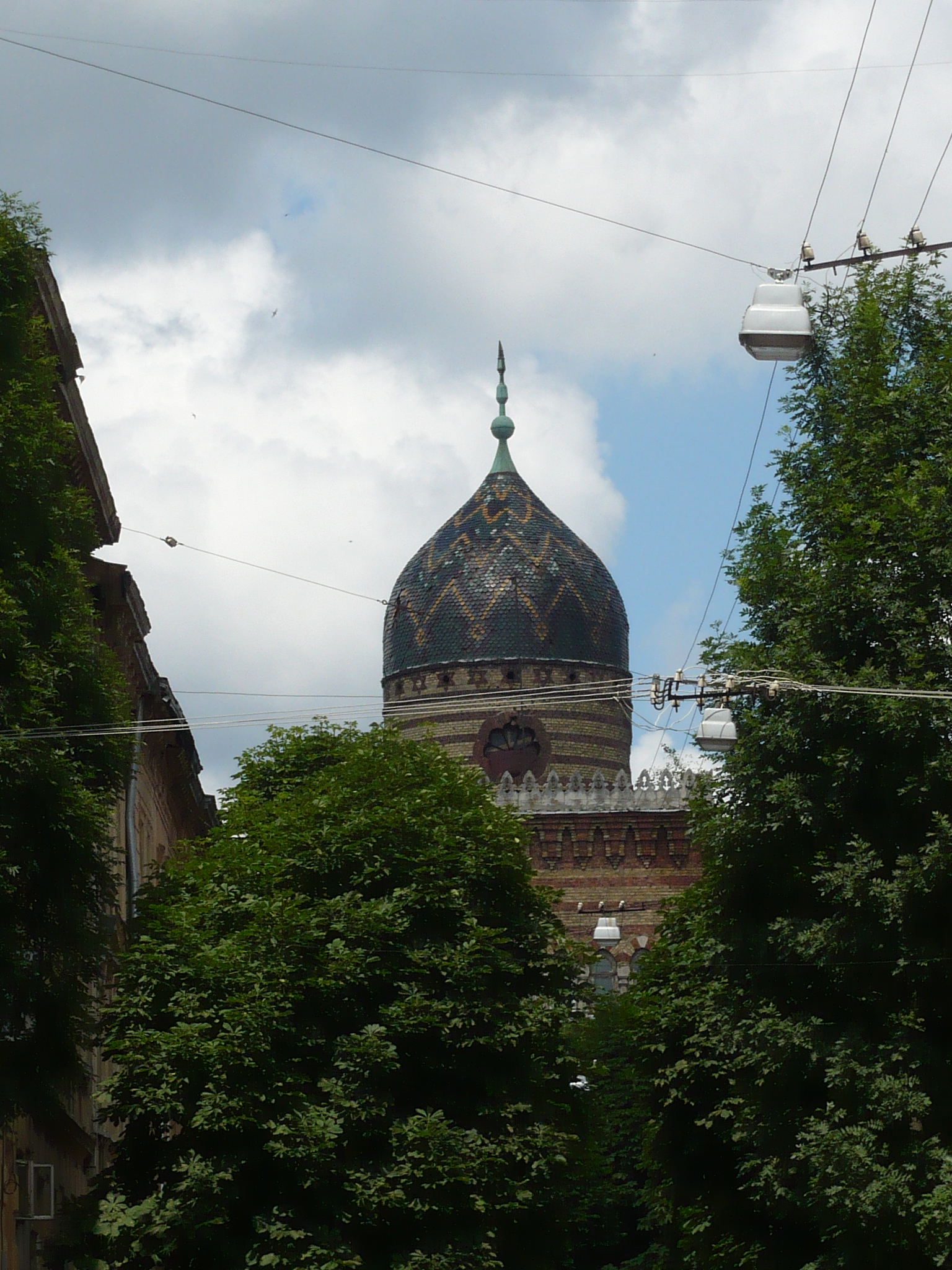 Lwów, ul. Jakuba Rappaporta 8 - Szpital żydowski im. M. Lazarusa, 1898-1901